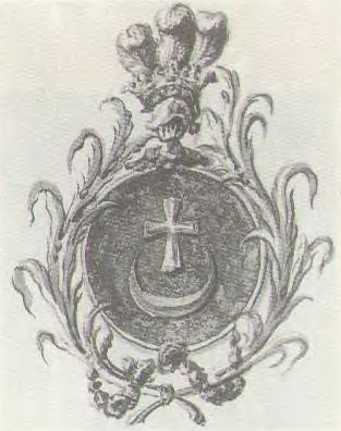 Беларуская (тарашкевіца): Ворша (Vorša). Магдэбурскі герб места